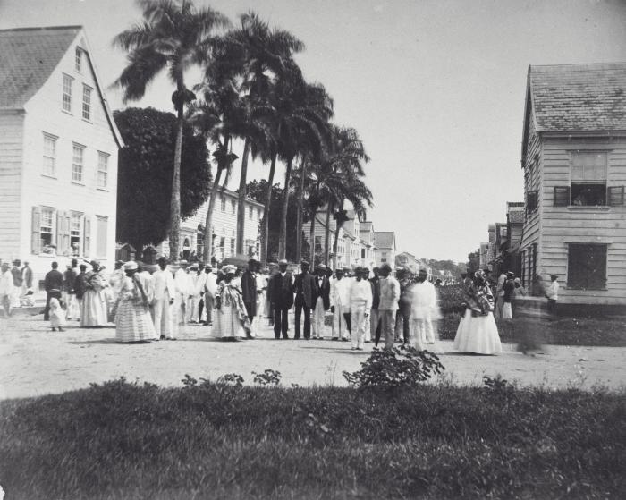 Foto. Het uitgaan van de kerk van de Evangelische- of Moravische Broedergemeente (Hernhutters) in de Steenbakkerijstraat